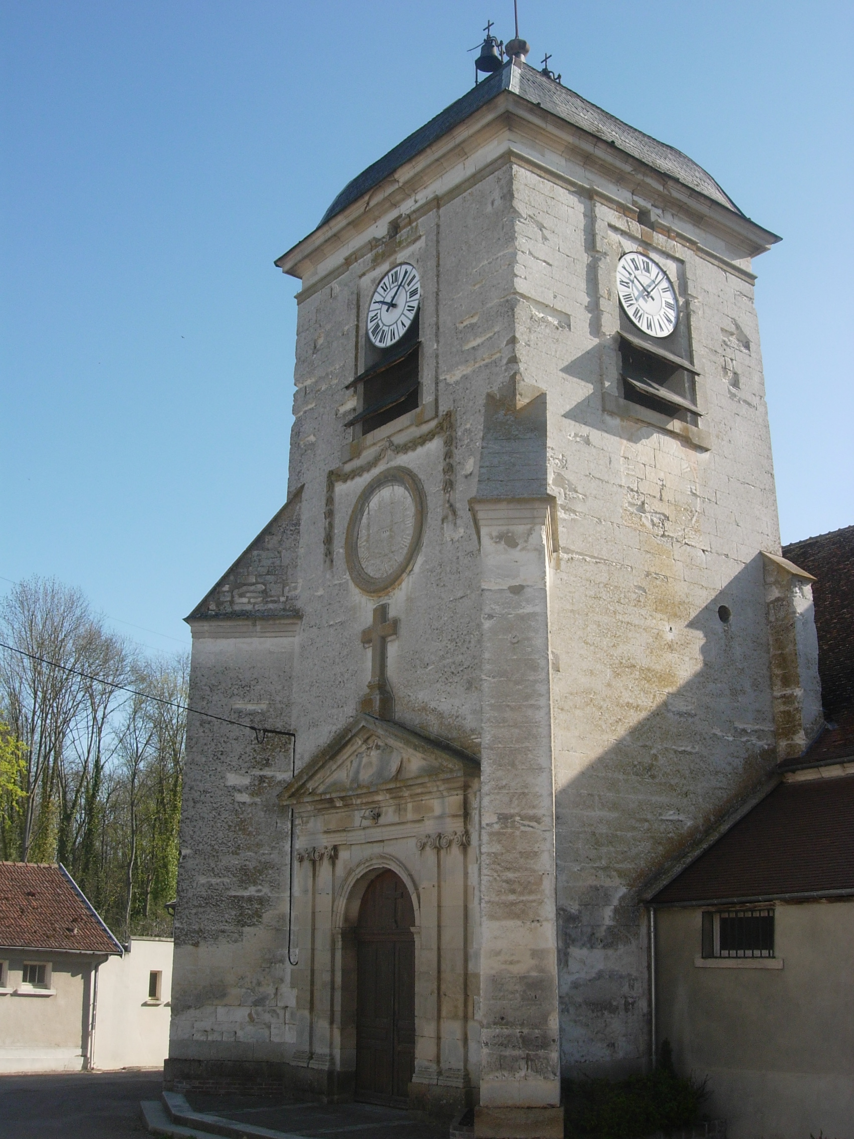 Eglise d'Estissac (Aube)